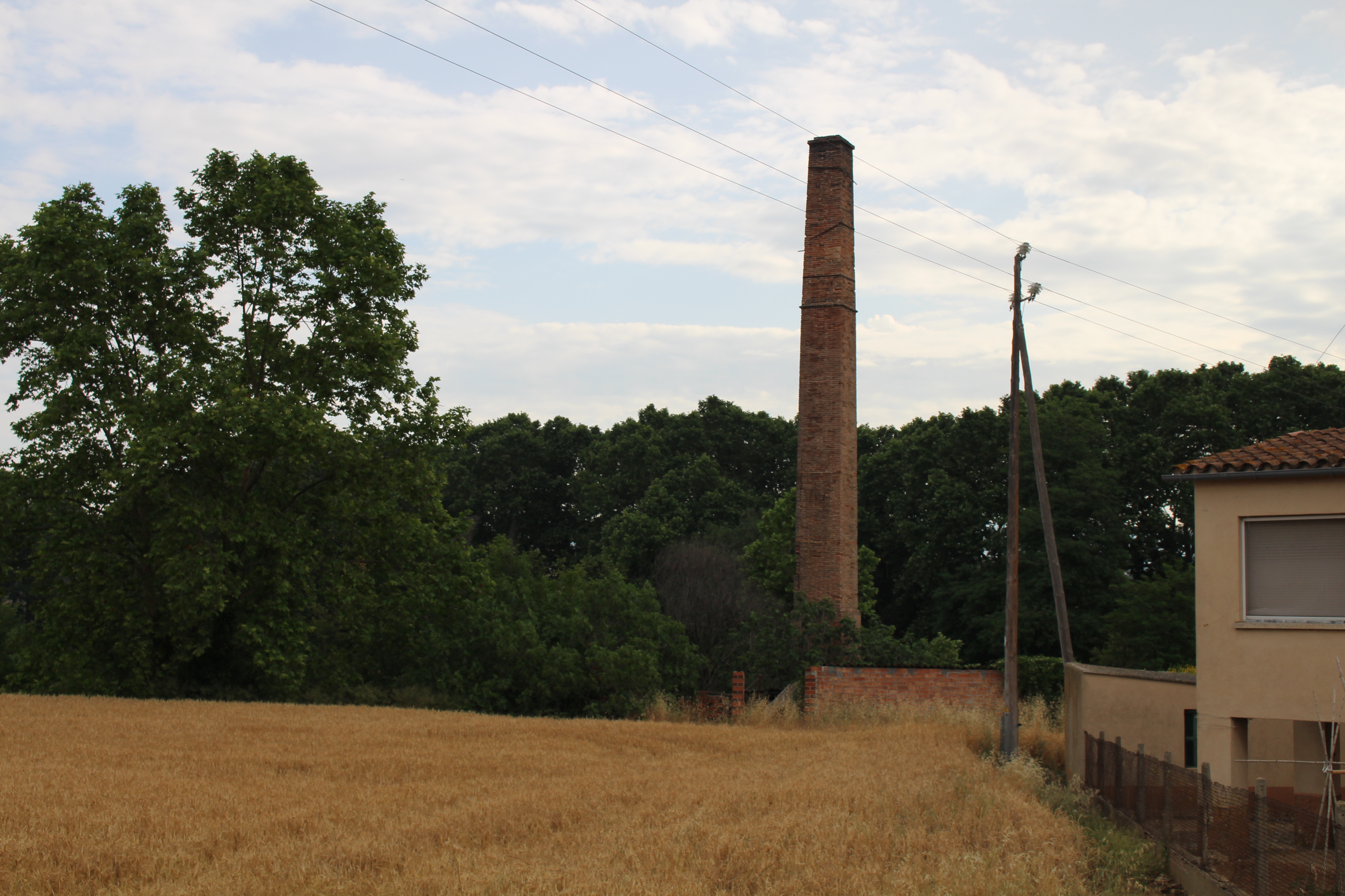 Xemeneia de la bòbila de Can Duran